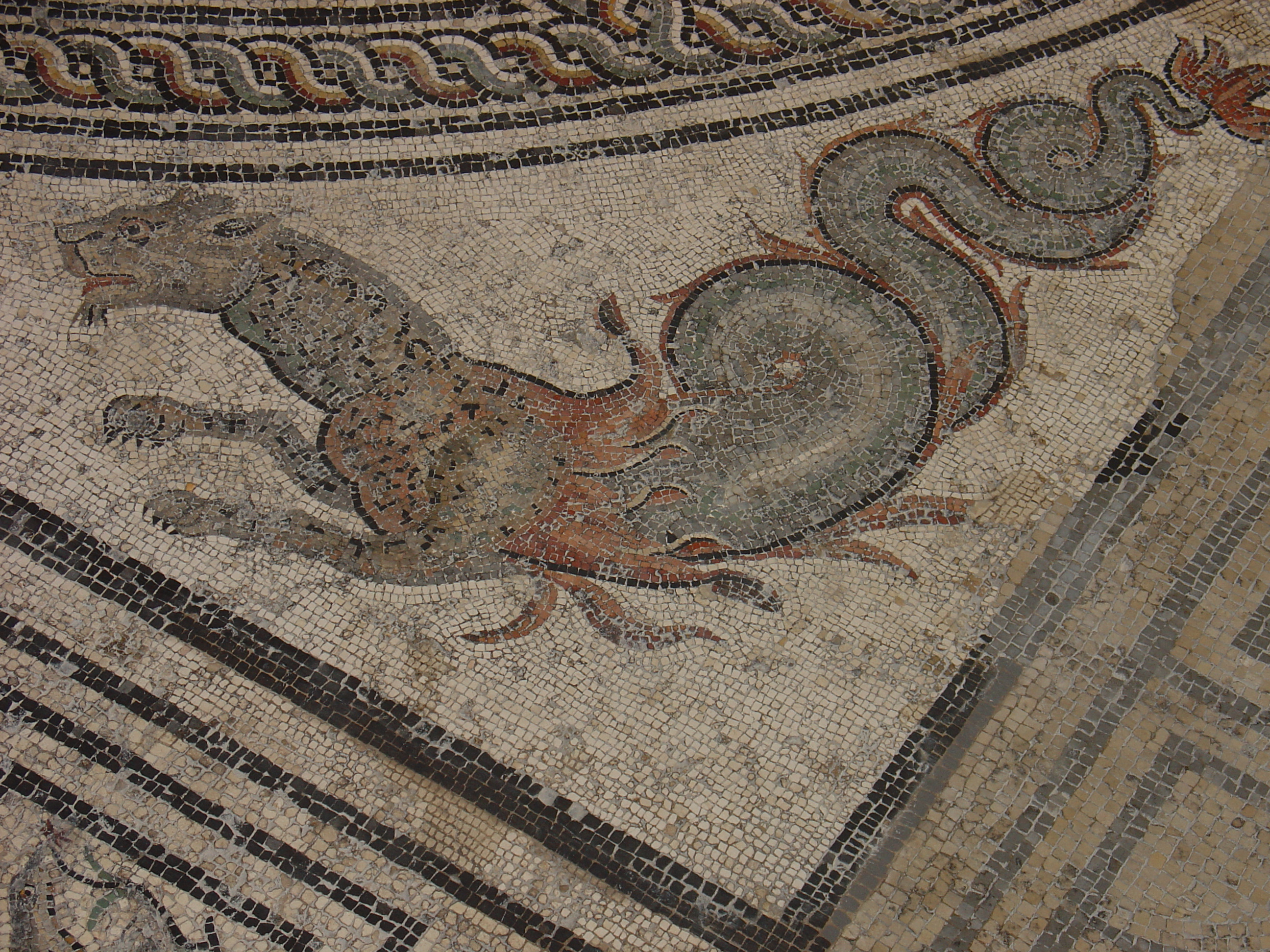 Vaison